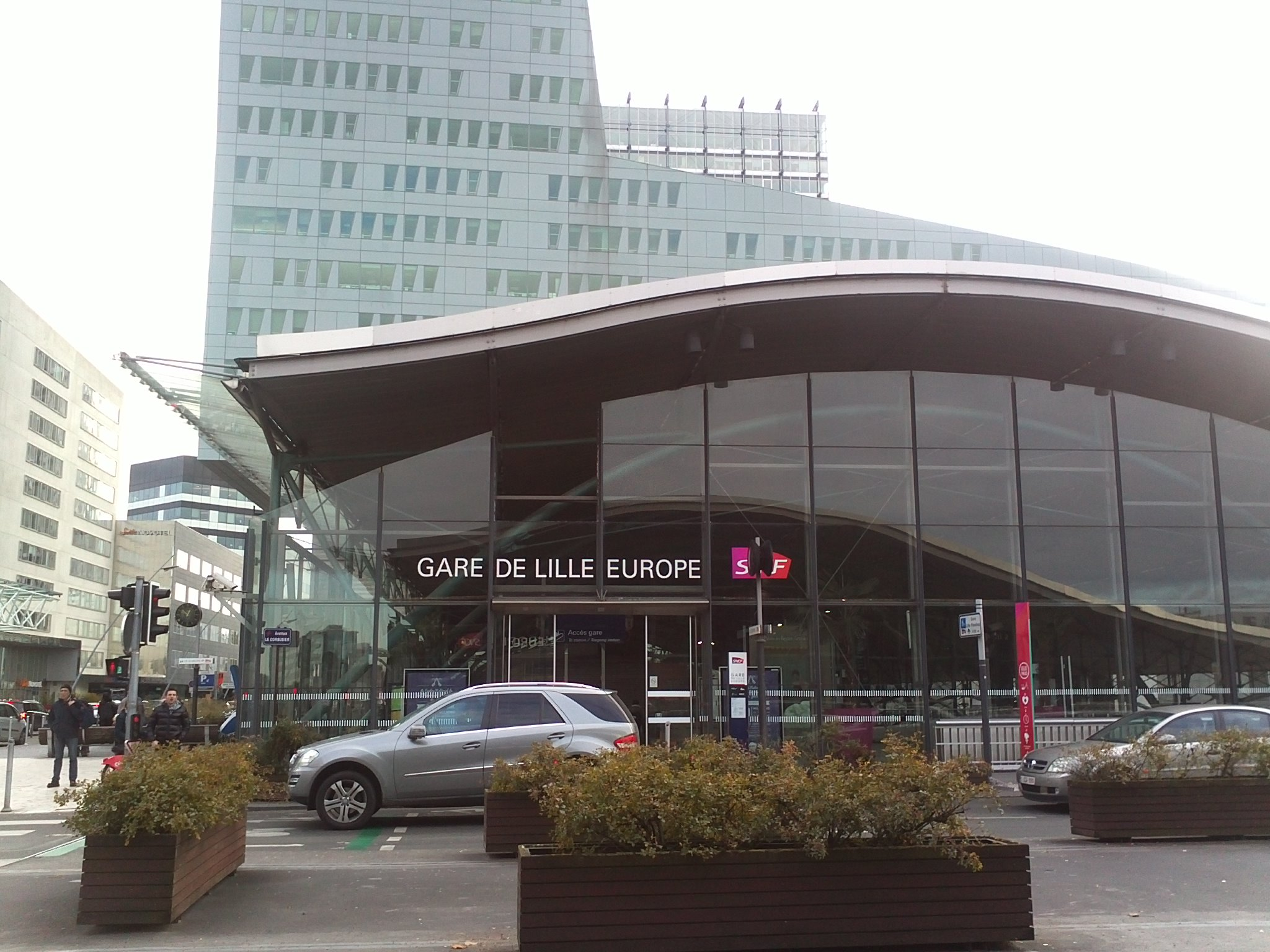 Gare de Lille Europe (2013)